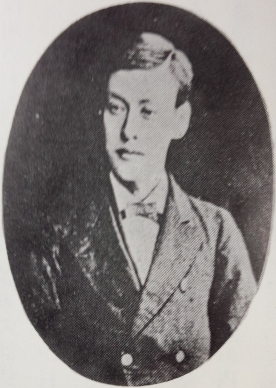 松平直致の肖像写真。